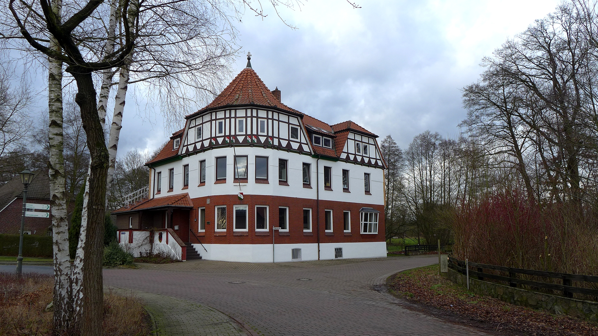 Haus der Burschenschaft Erica zu Suderburg im BDIC.